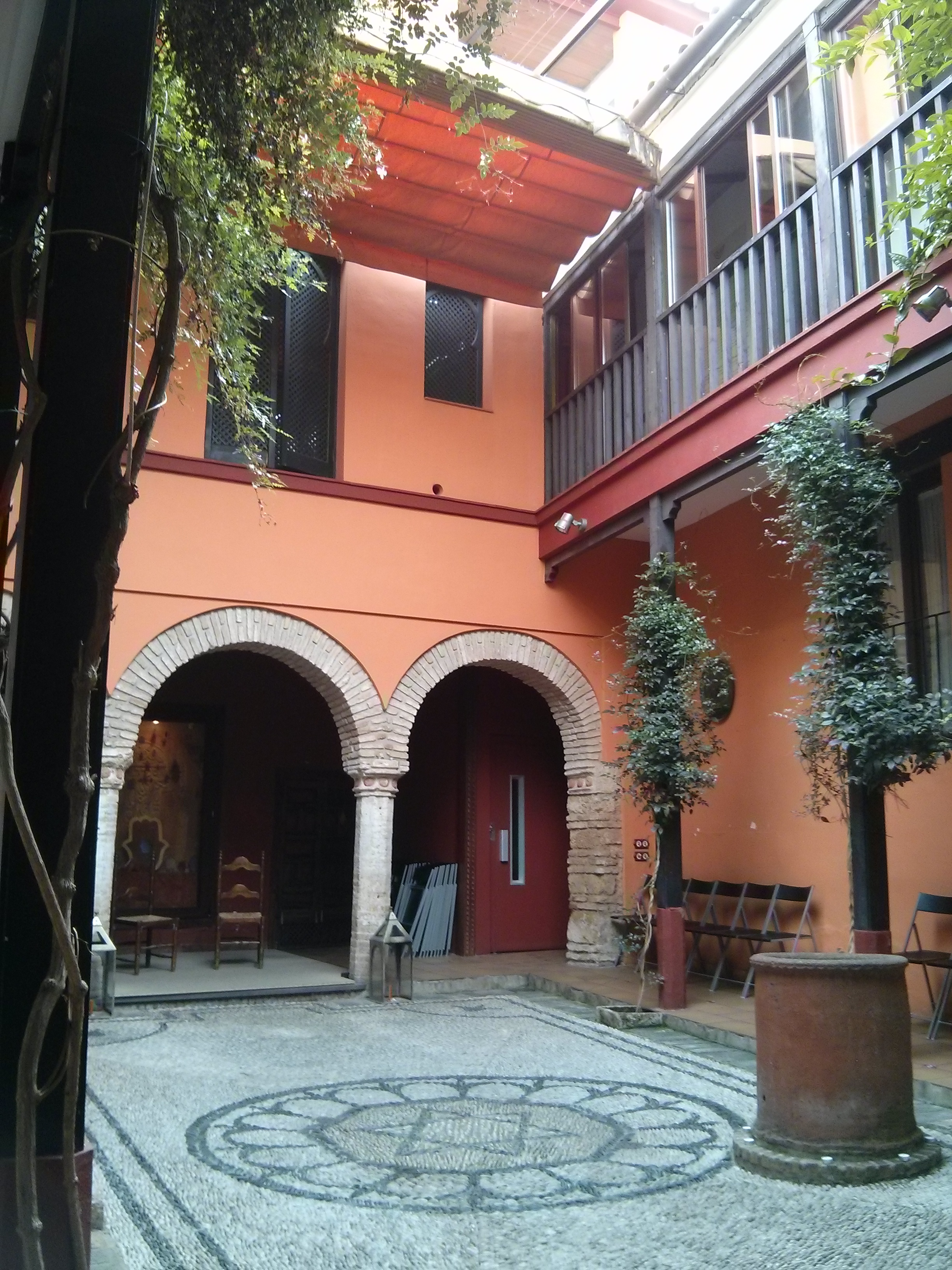 Casa de Sefarad, Córdoba (España).